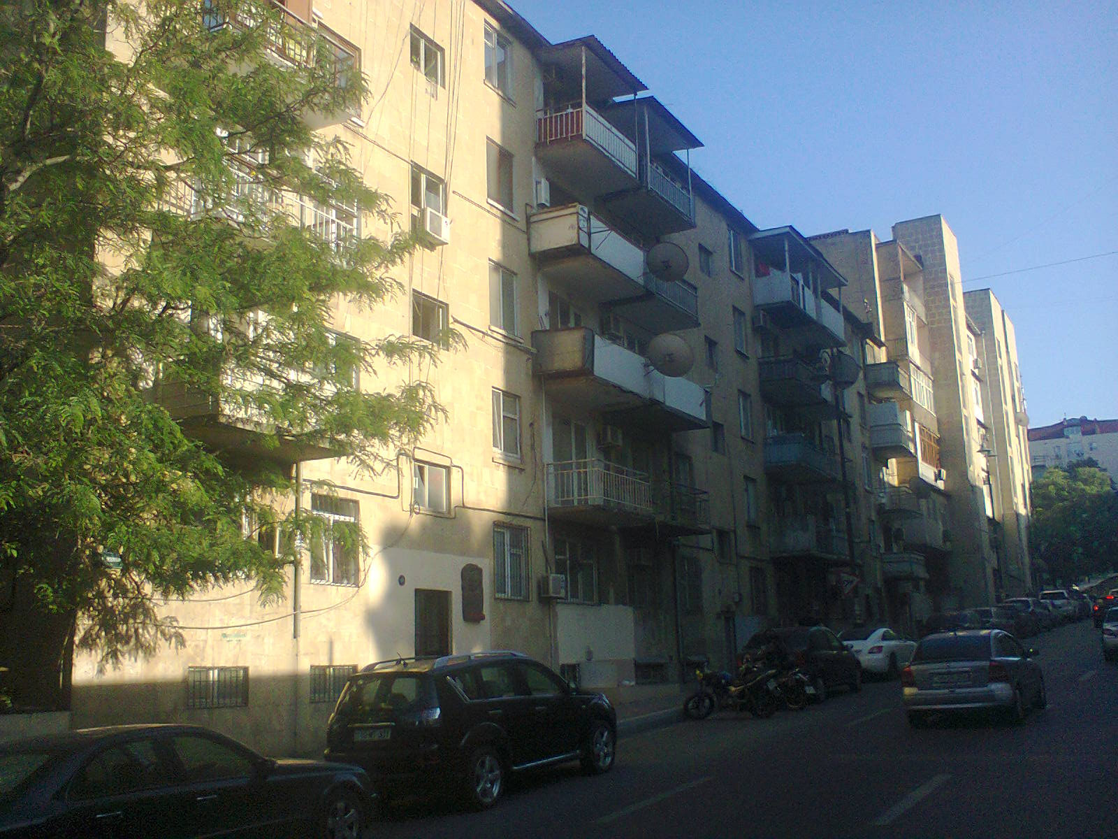 Дом где жил Ислам Сафарли